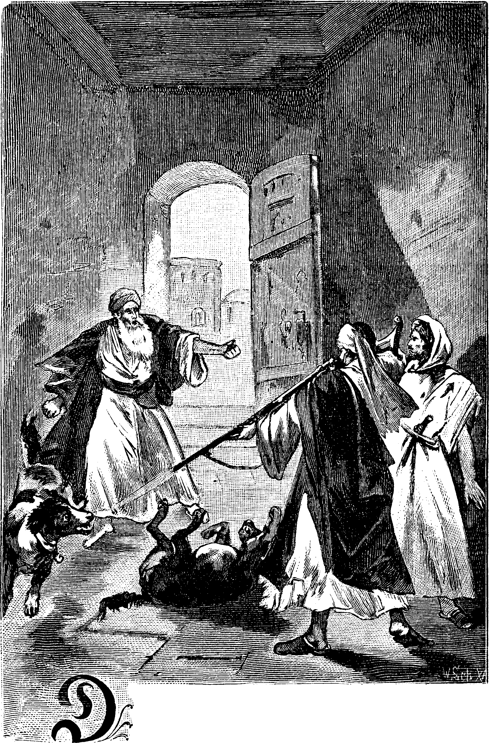 Der Verfluchte